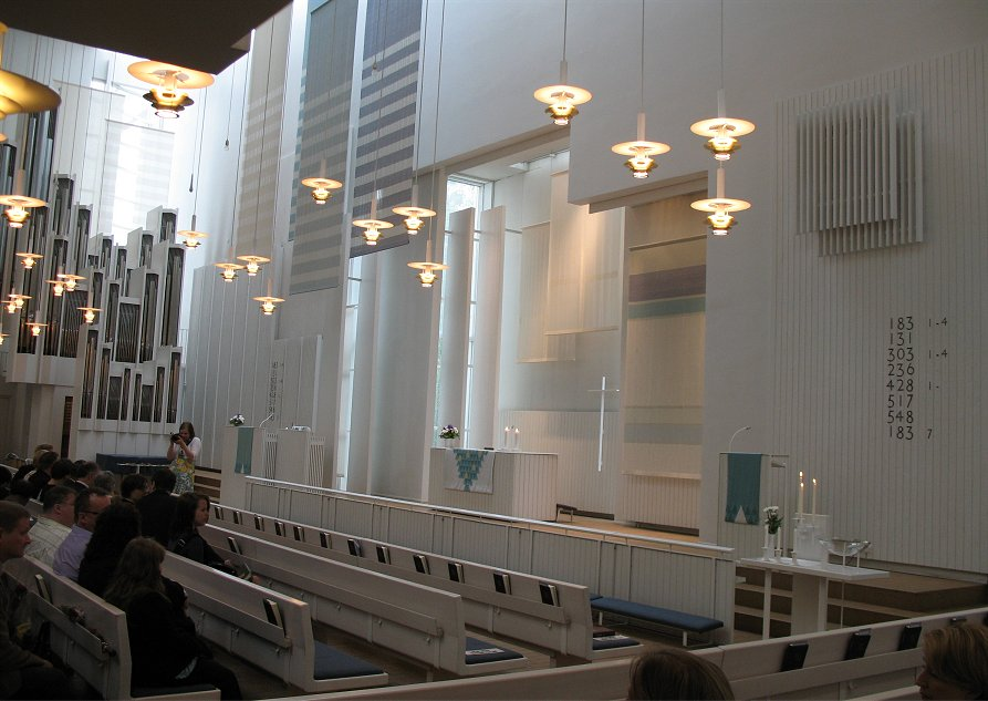 Myyrmäen kirkkoa sisältä (kesä 2009). Huom: Muista säilyttää viittaus kuvaajaan, mikäli käytät kuvaa.